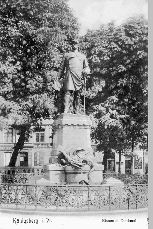 Bismarck-Denkmal in Königsberg (Ostpreußen) (heute Kaliningrad), Kaiser-Wilhelm-Platz; 1901 von Bildhauer Friedrich Reusch